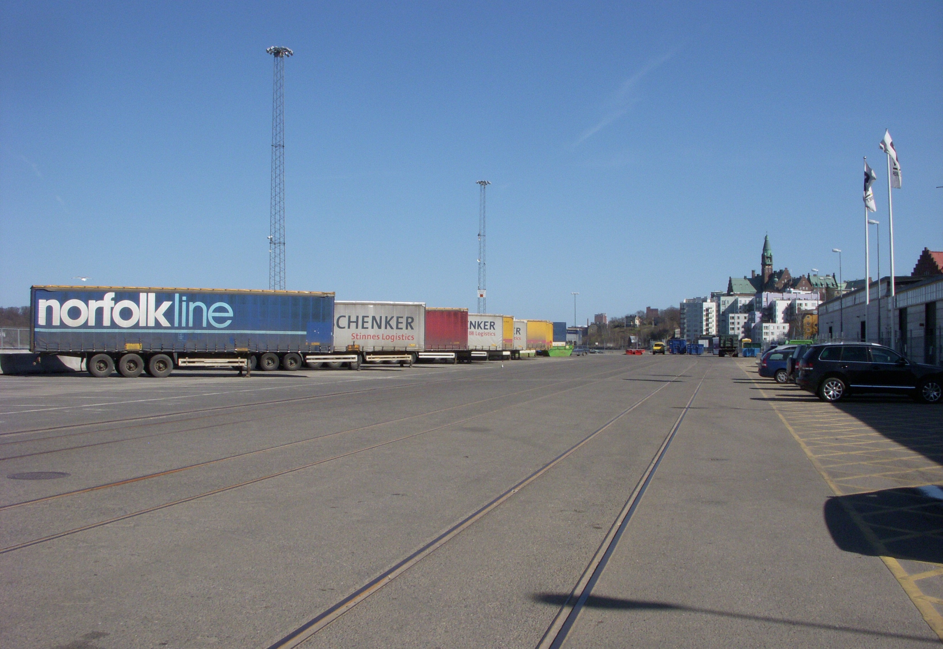 Yttre Masthamnen, vy mot öst